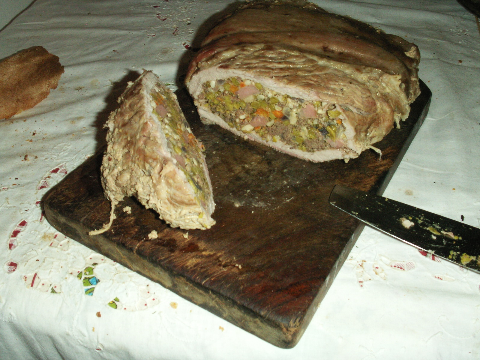 Cima alla genovese fatta in casa